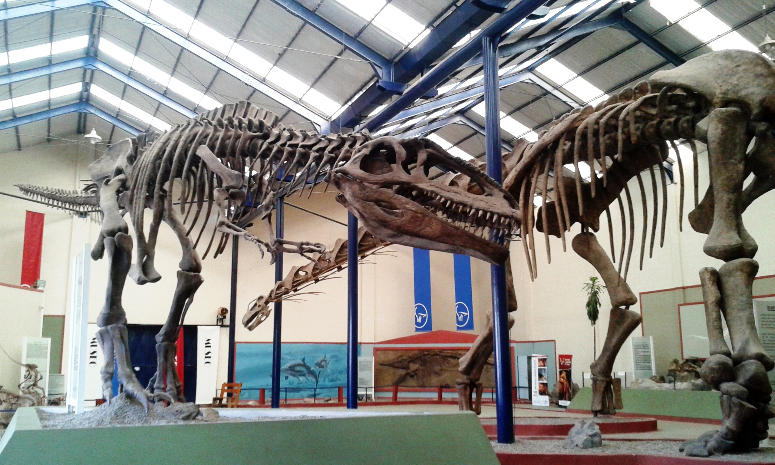 Interior del Museo municipal "Carmen Funes". Exhibición Paleontólogica.